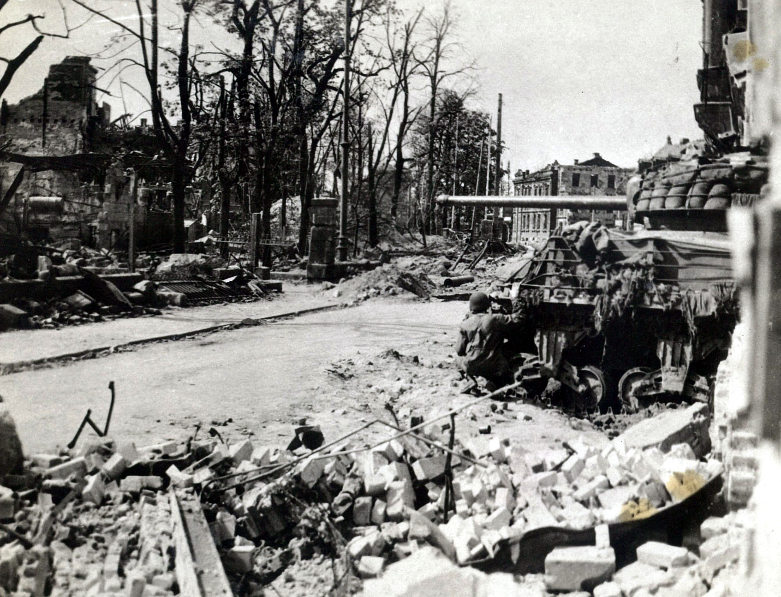 Das zerstörte und befreite Nürnberg im April 1945